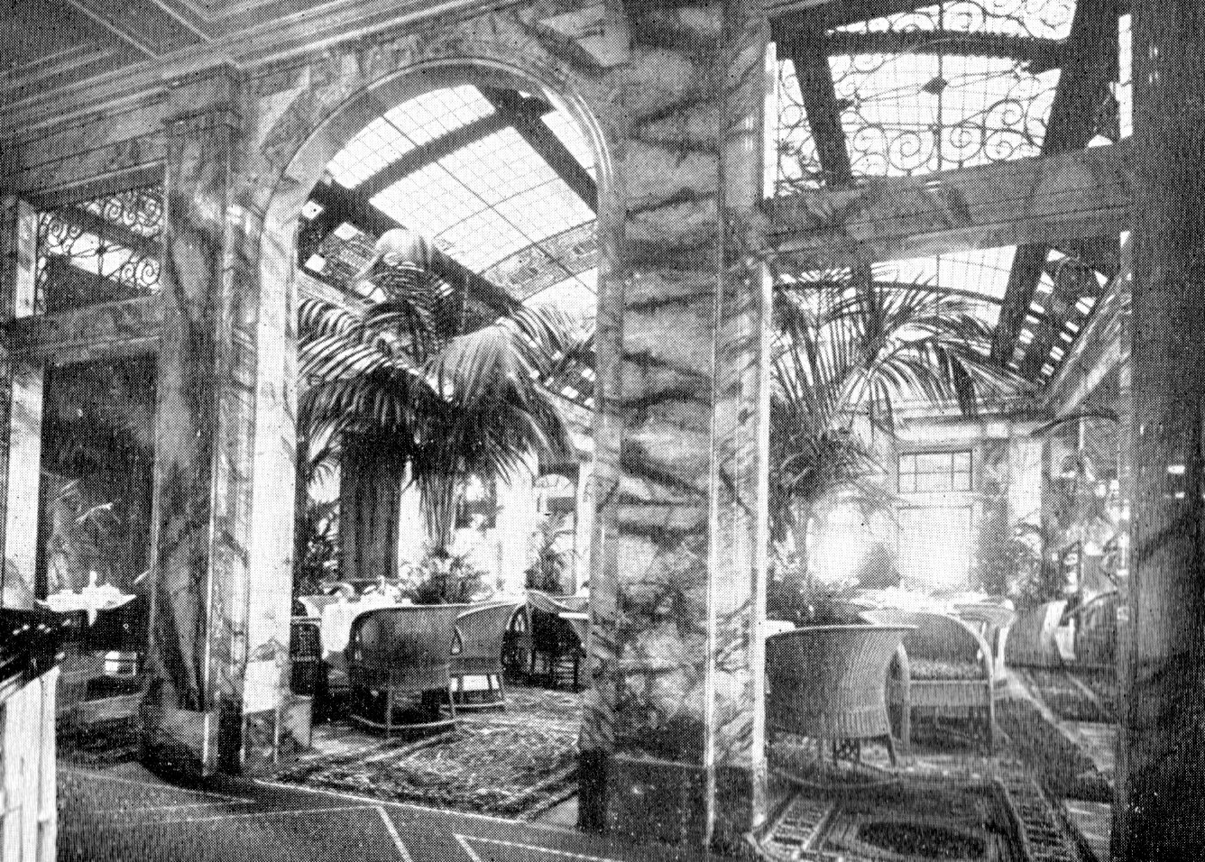 Passagierdampfer "Cap Trafalgar" der Hamburg-Süd. Marmorportal des Wintergartens Frühjahr 1914